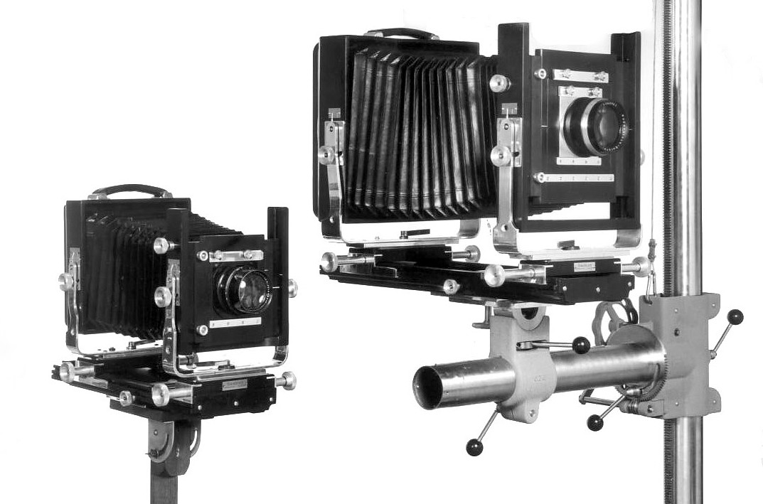 Två Szabad-kameror för 12x16 och 18x24 cm format